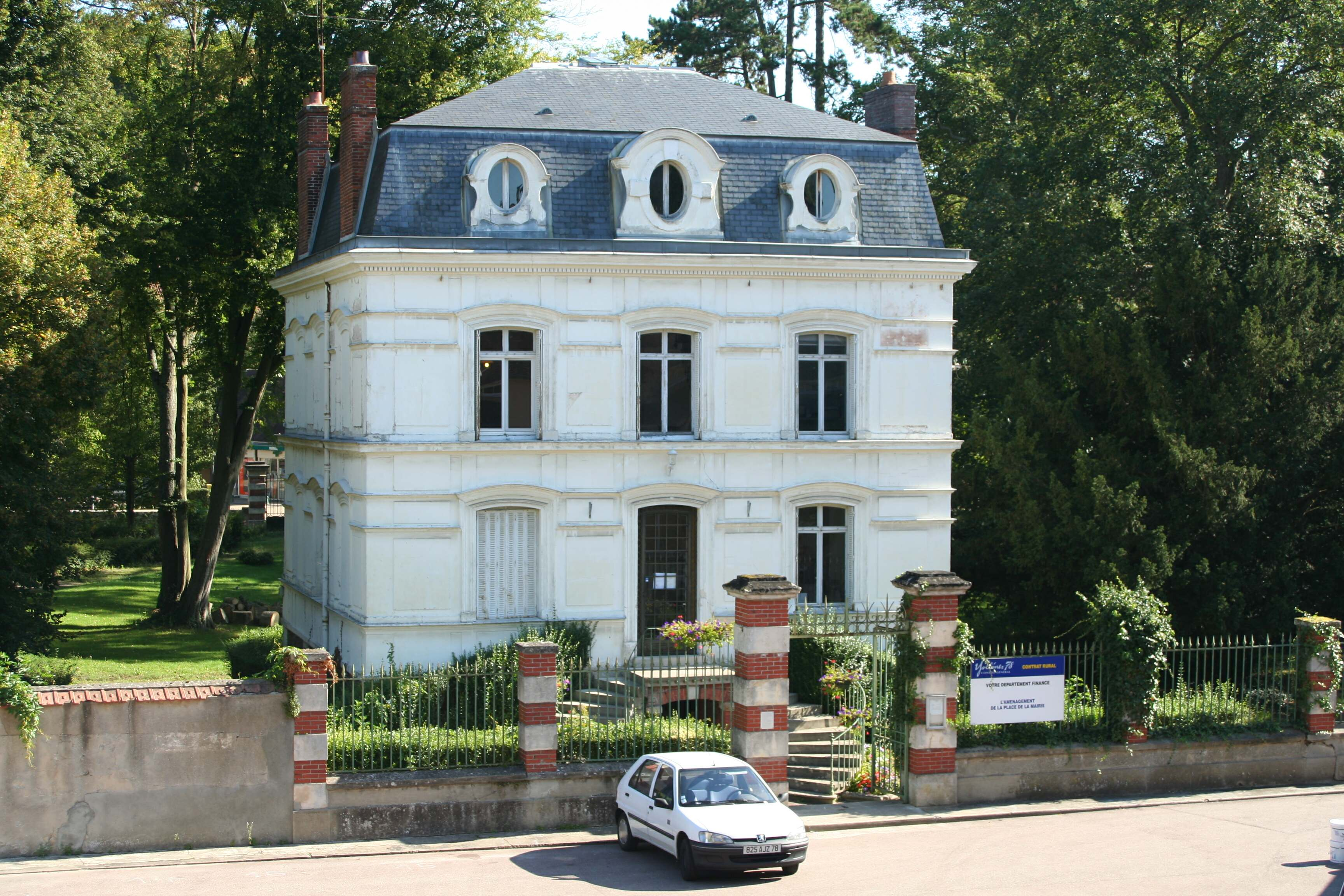 Mairie de Oinville-sur-Montcient - Yvelines (France)